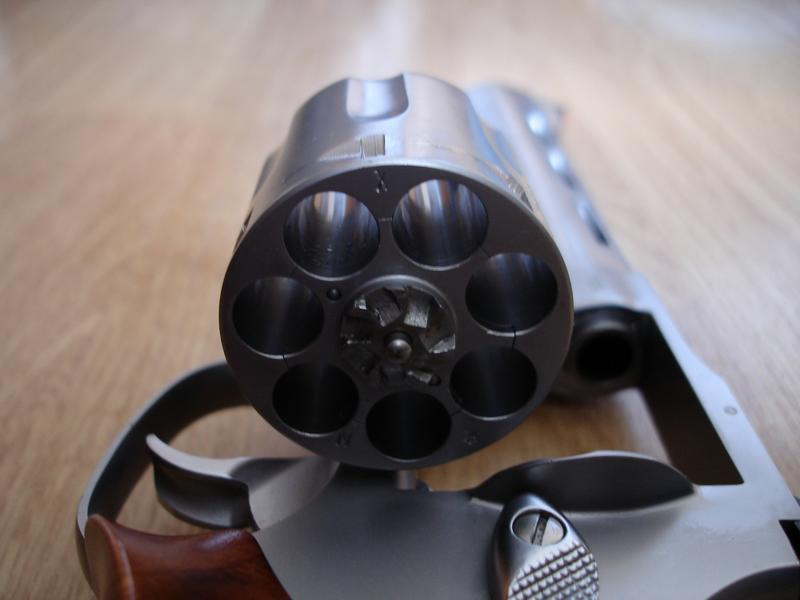 Taurus 627-KLM .357MAG (TRACKER)